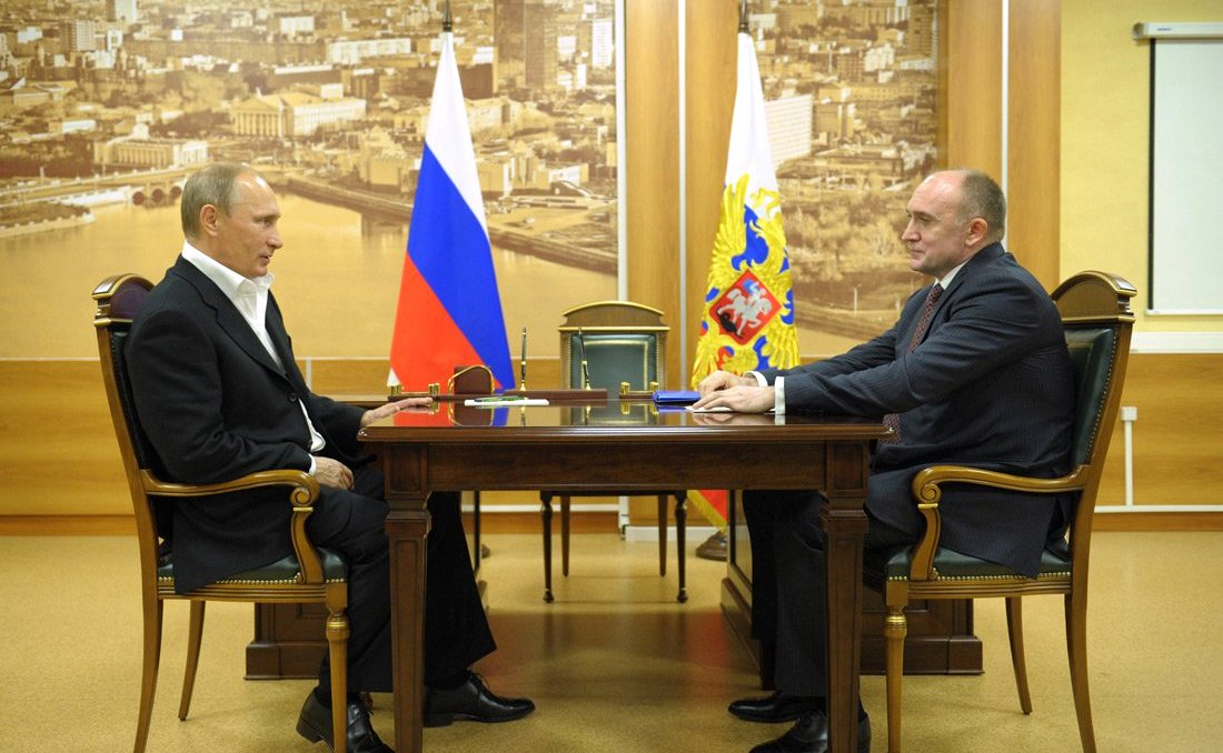 Рабочая встреча Президента России Владимира Путина с губернатором Челябинской области Борисом Дубровским